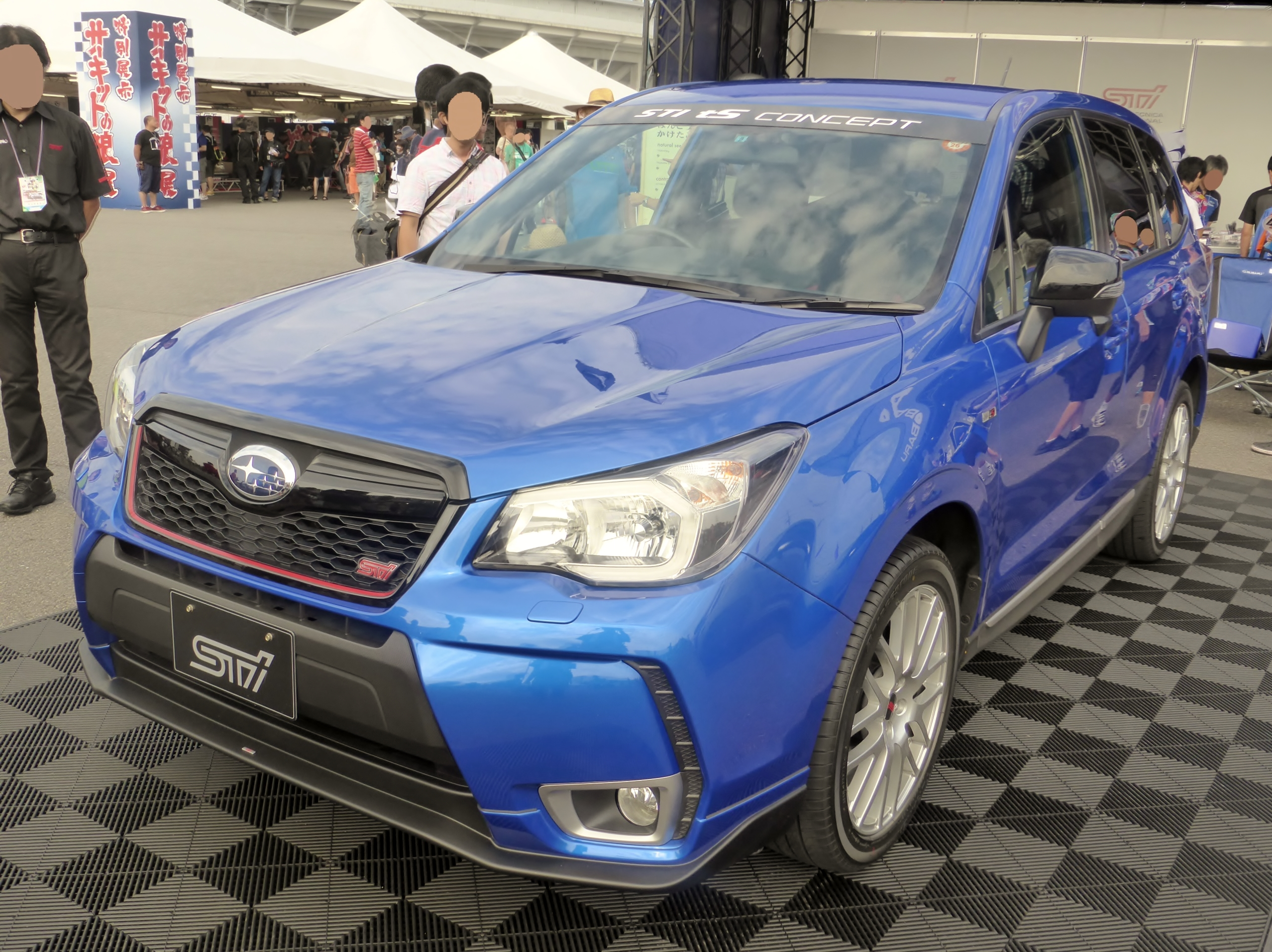 SJ型スバル・フォレスターSTI tSコンセプトをフロントから撮影。